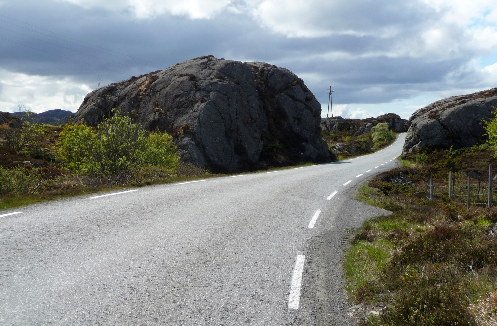 Karmøy 05.2010